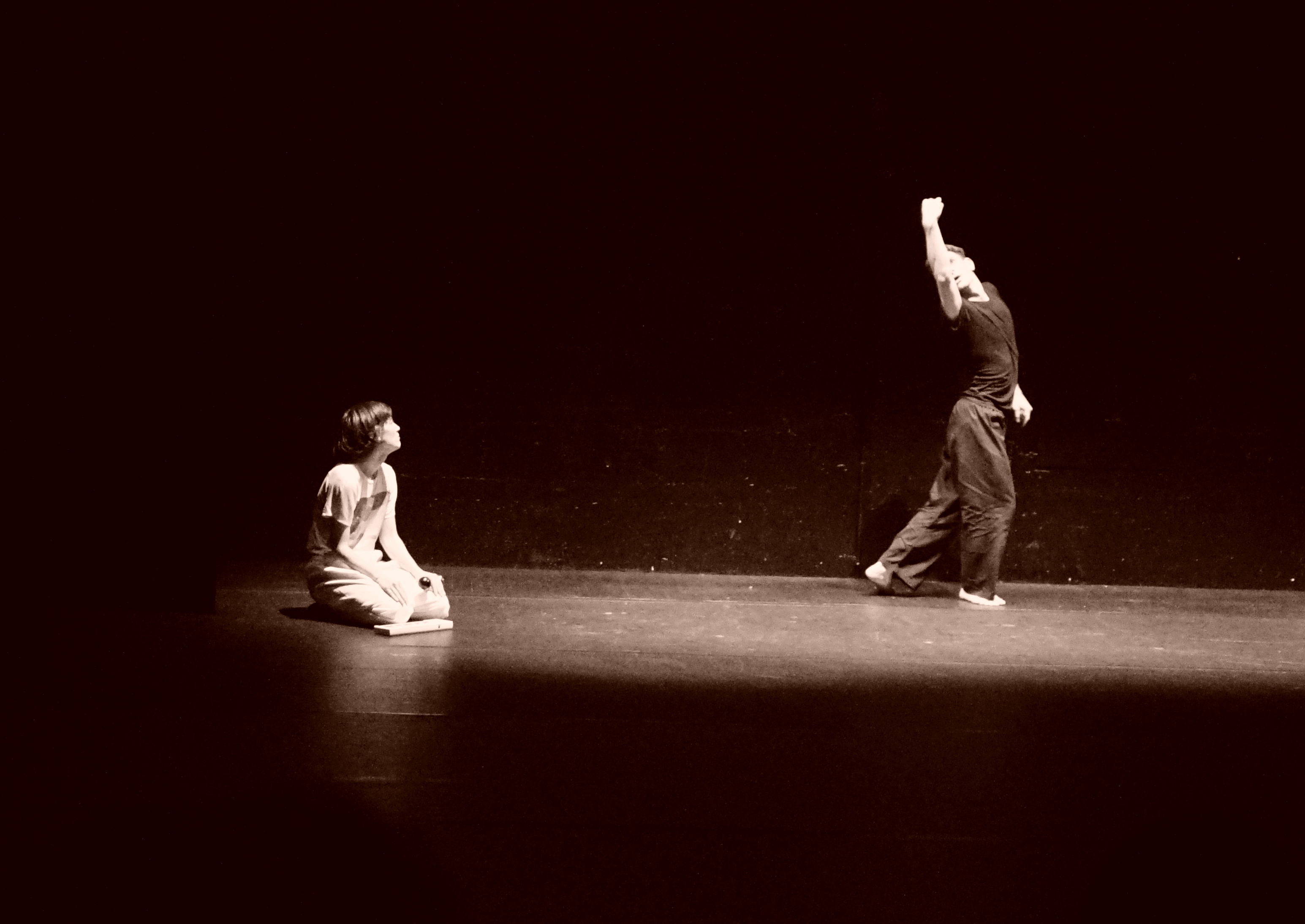 lors du festival de 2016.